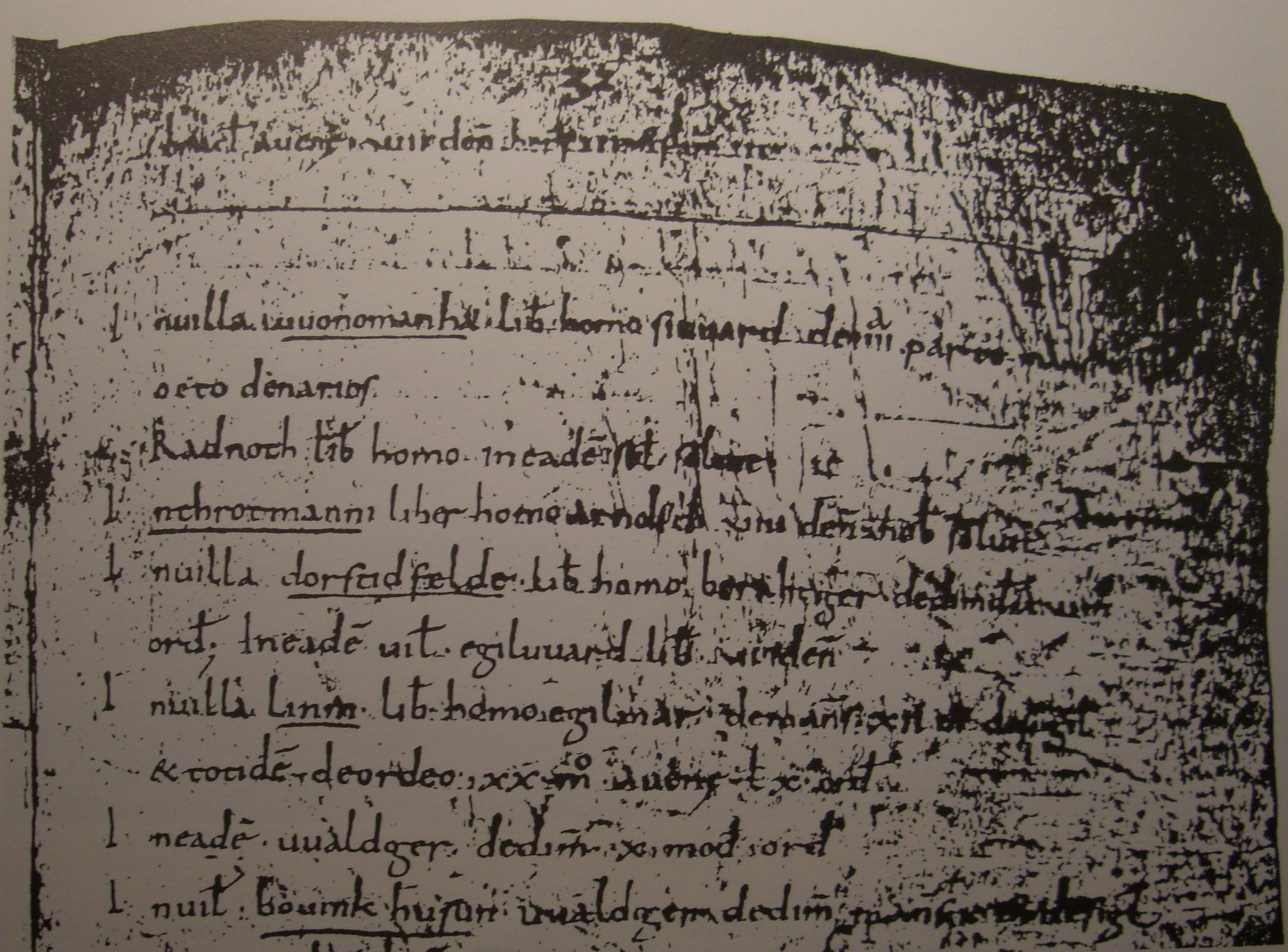 Erste urkundliche Erwähnung Dortmund-Bövinghausens in einer Hebeliste des Klosters Werden (bei Essen), NRW